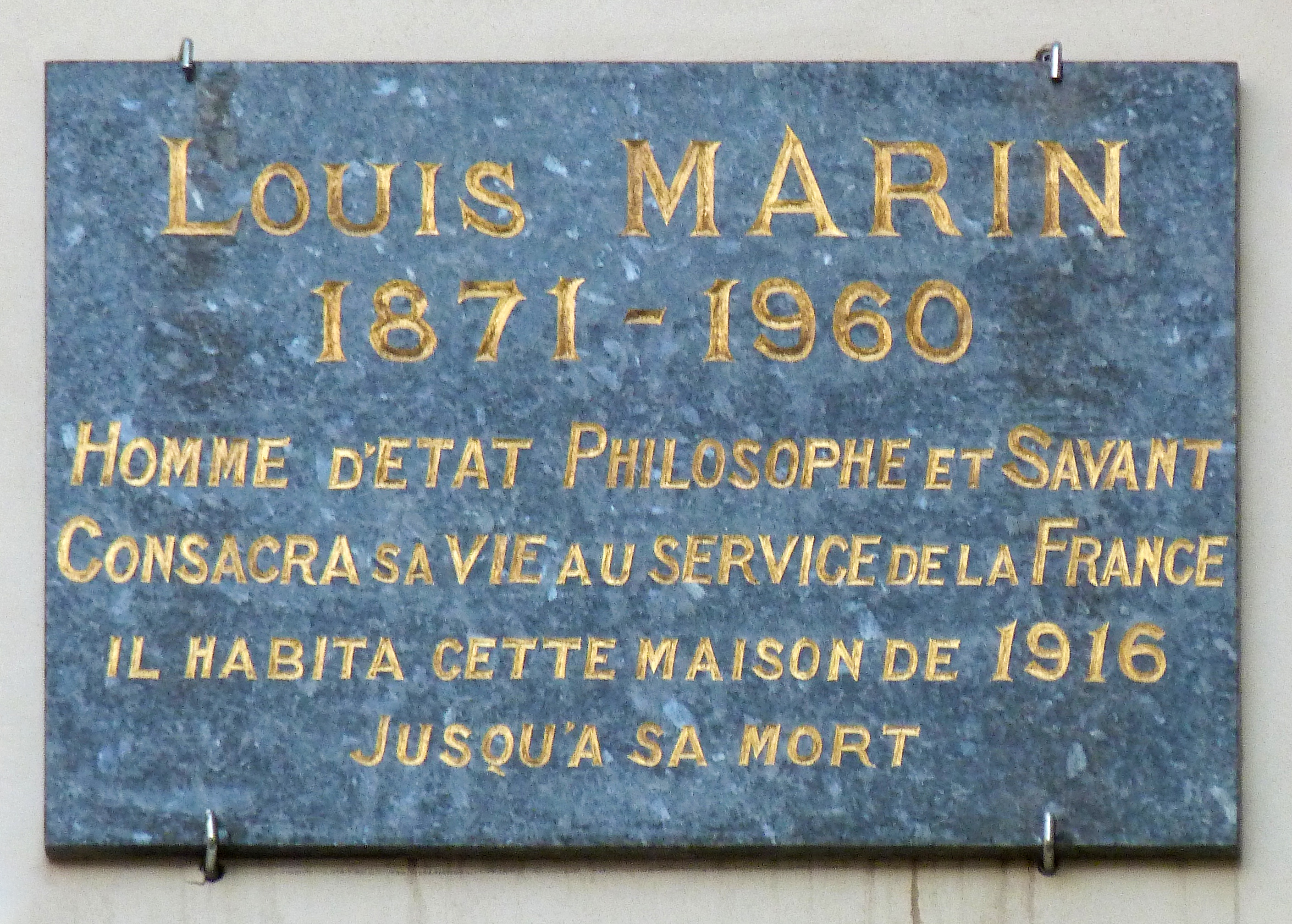 Plaque posée sur le n°95 du boulevard Saint-Michel (Paris, 5e arrond.) - Louis Marin (1871-1960) habita dans cette maison de 1916 à sa mort.